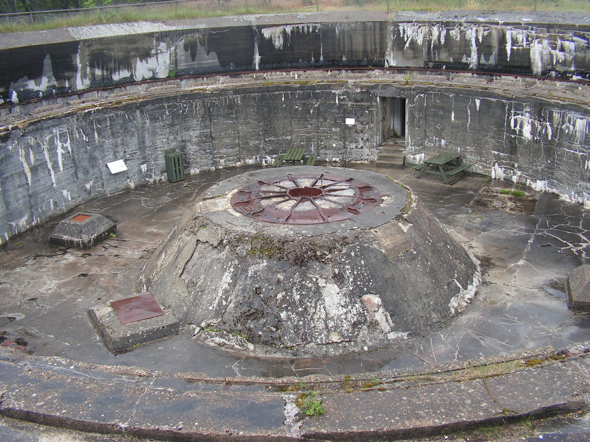 Drehkranz einer 38 cm Kanone in Hanstholm